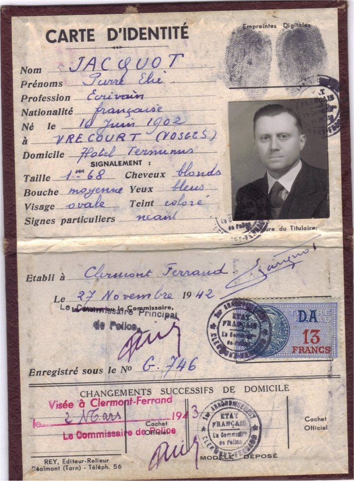 Fausse carte d'identité établie au nom de Pierre Elie Jacquot fin 1942